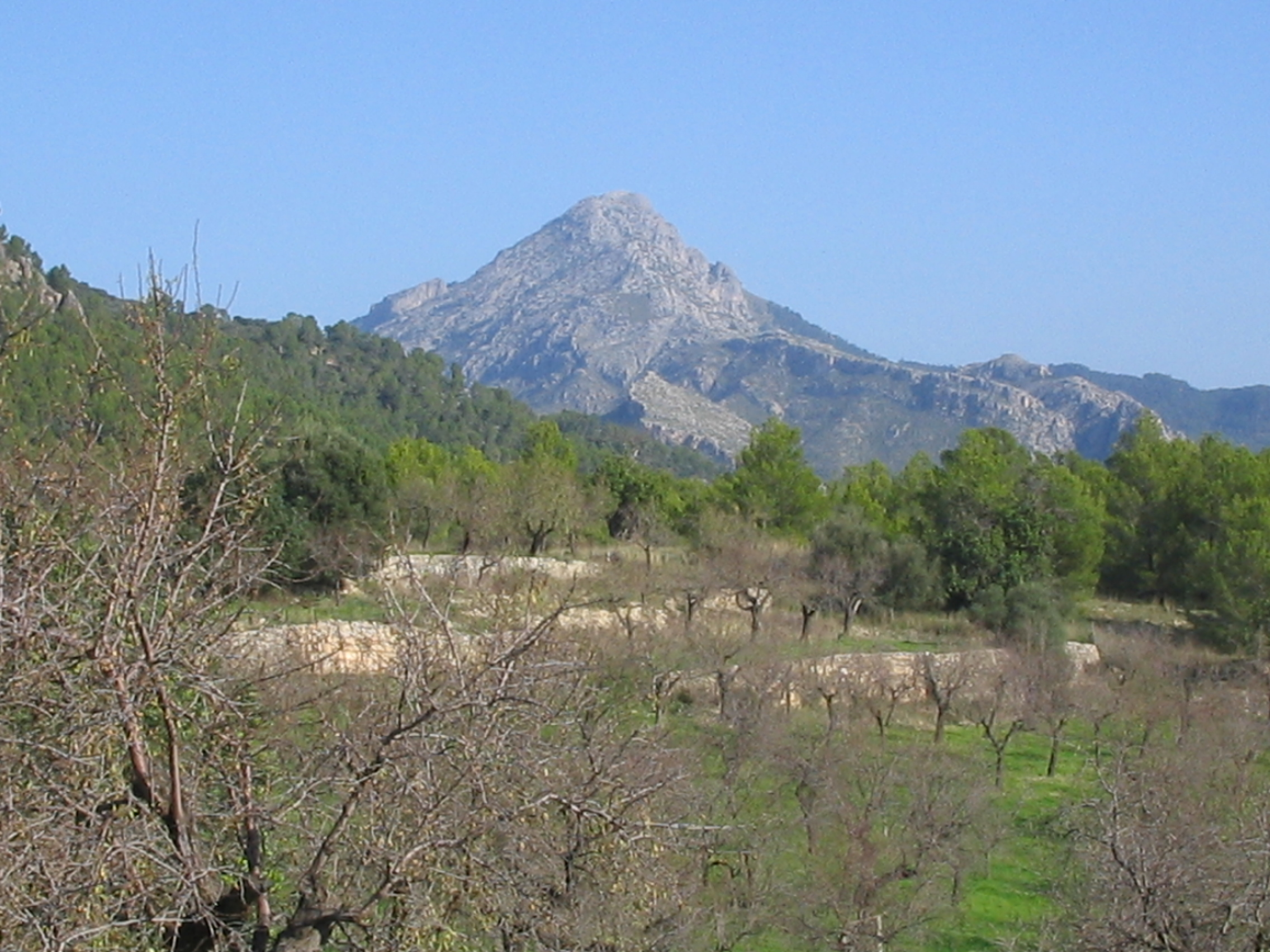 A mountain called Puig de Galatzò located at Sierra de Tramontana in a village called Puigpunyent in Palma de Mallorca, Spain.